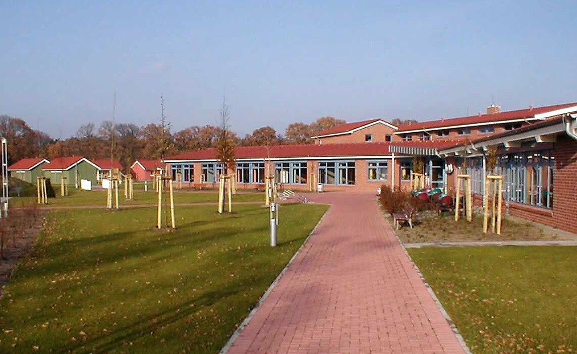 Die Jugendherberge in Rieste am Alfsee wurde im Jahr 2000 eröffnet.